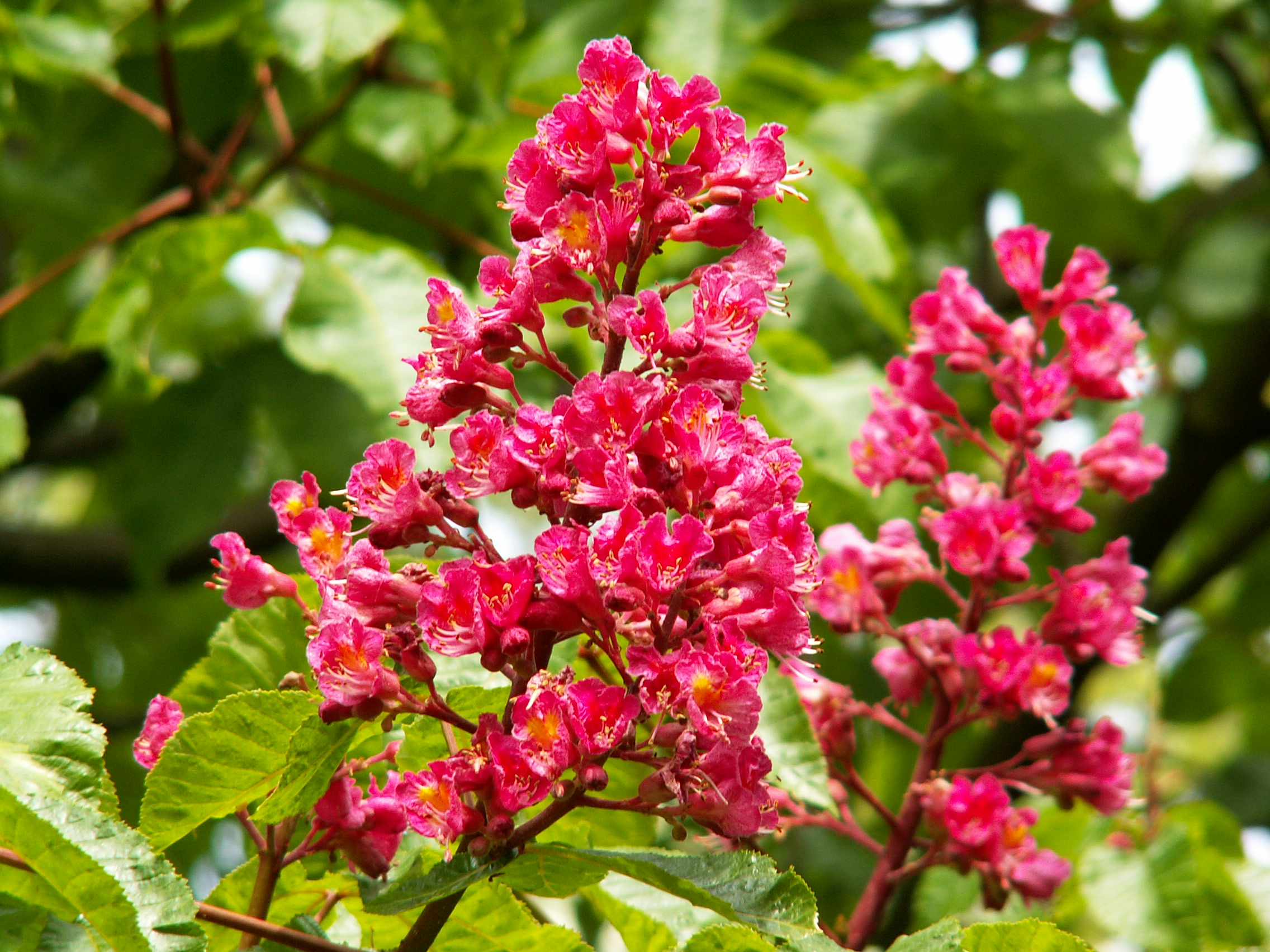 Aesculus x carnea, Kasztanowiec czerwony (pl), Fleischrote Rosskastanie (de)